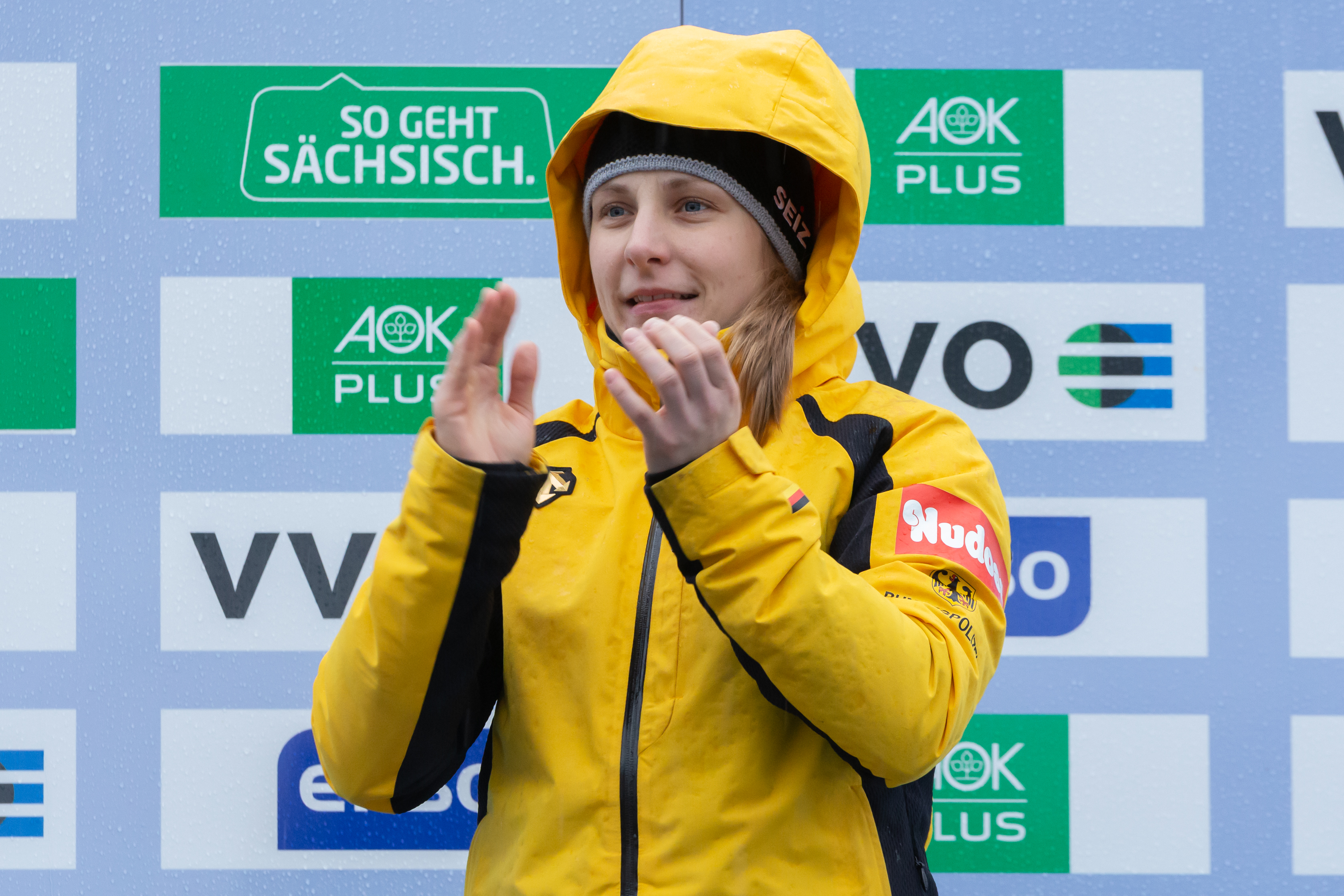 Deutsche Meisterschaften Skeleton; Tina Hermann (WSV Königssee); Sieger, Erstplatzierter, Goldmedaille, gold medal; Flower Ceremony, Blumenzeremonie, Siegerehrung; Jubel, celebration